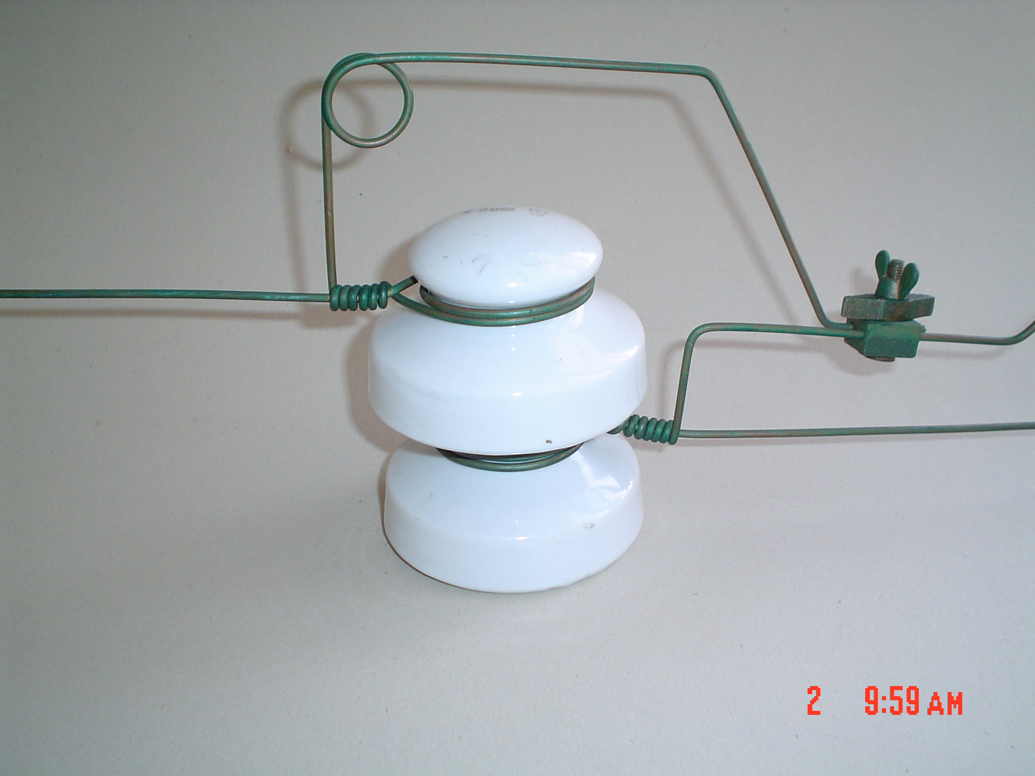 Bronz légvezeték porcelán szigetelőn – mérőpont (Telefónia múzeum, Budapest)